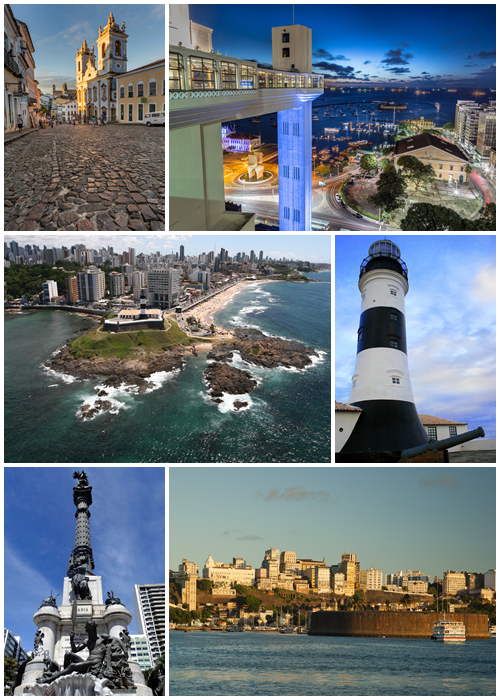 Montagem de fotos de Salvador, Brasil.